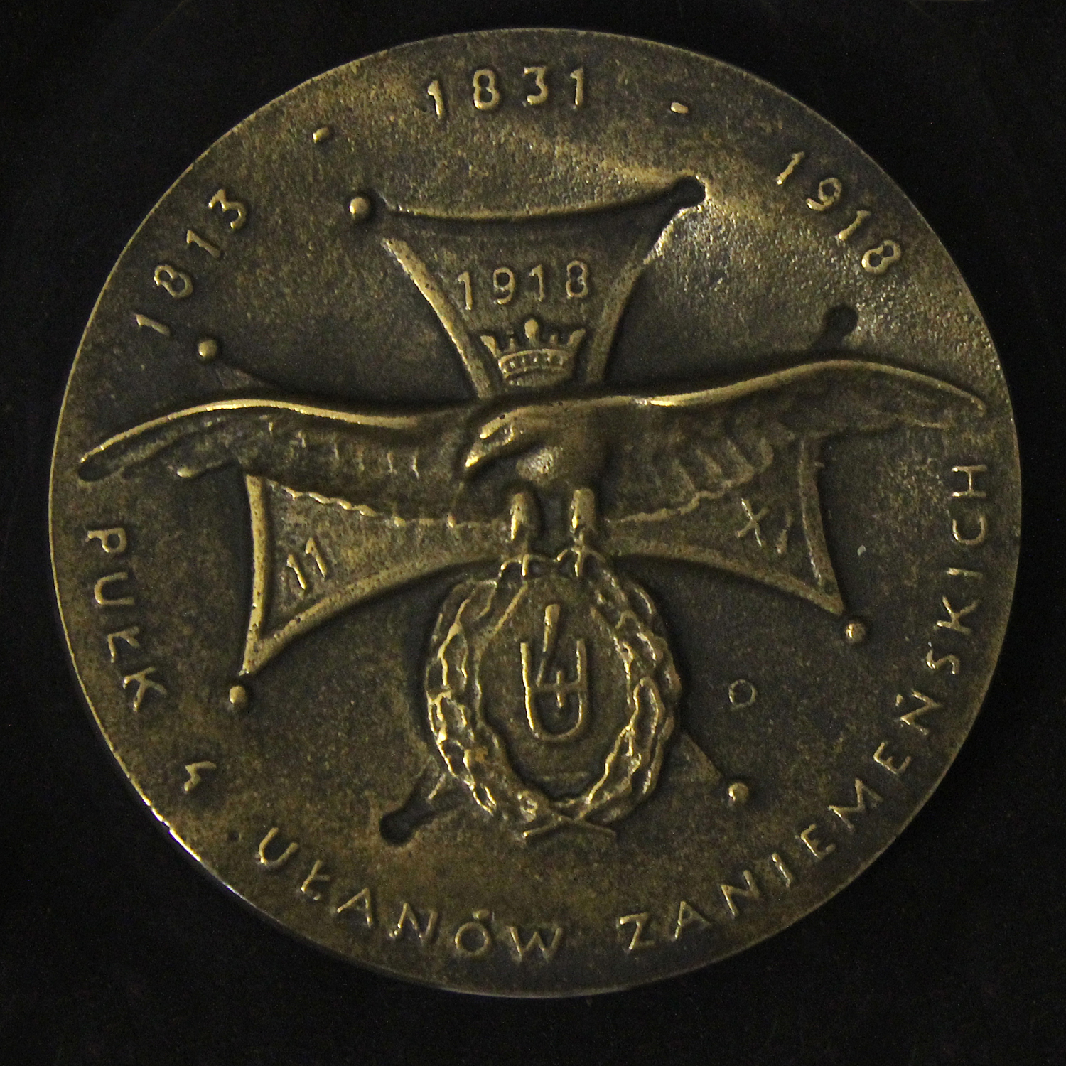 Medal pamiątkowy 4 pułku ułanów zaniemeńskich